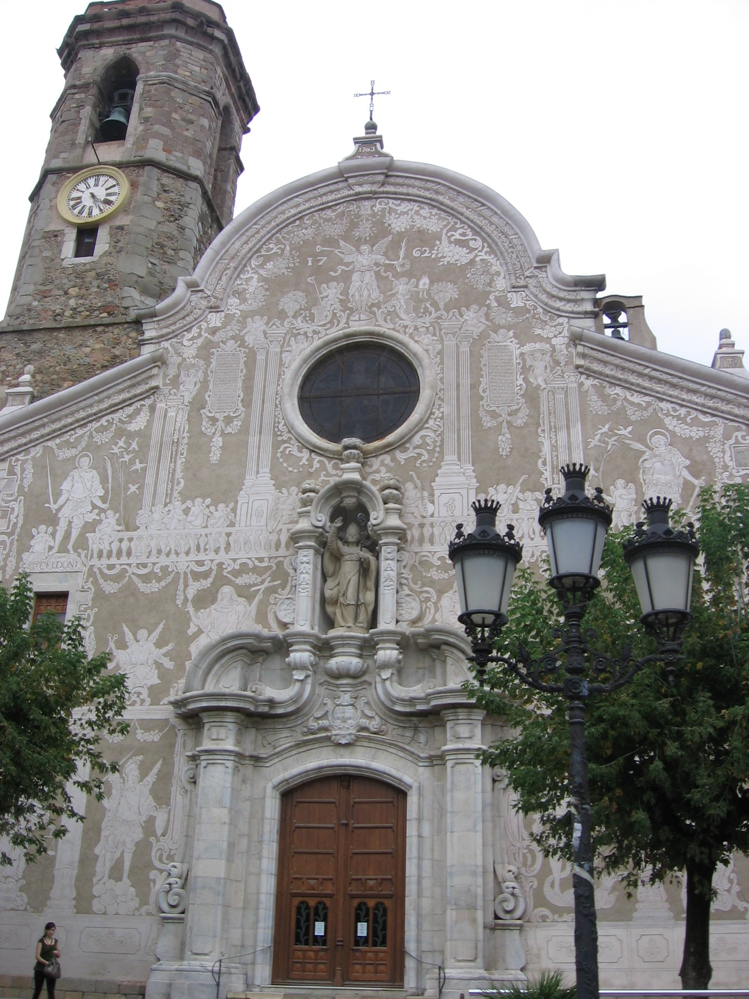 Iglesia de Sant Martí, Sant Celoni (provincia de Barcelona).